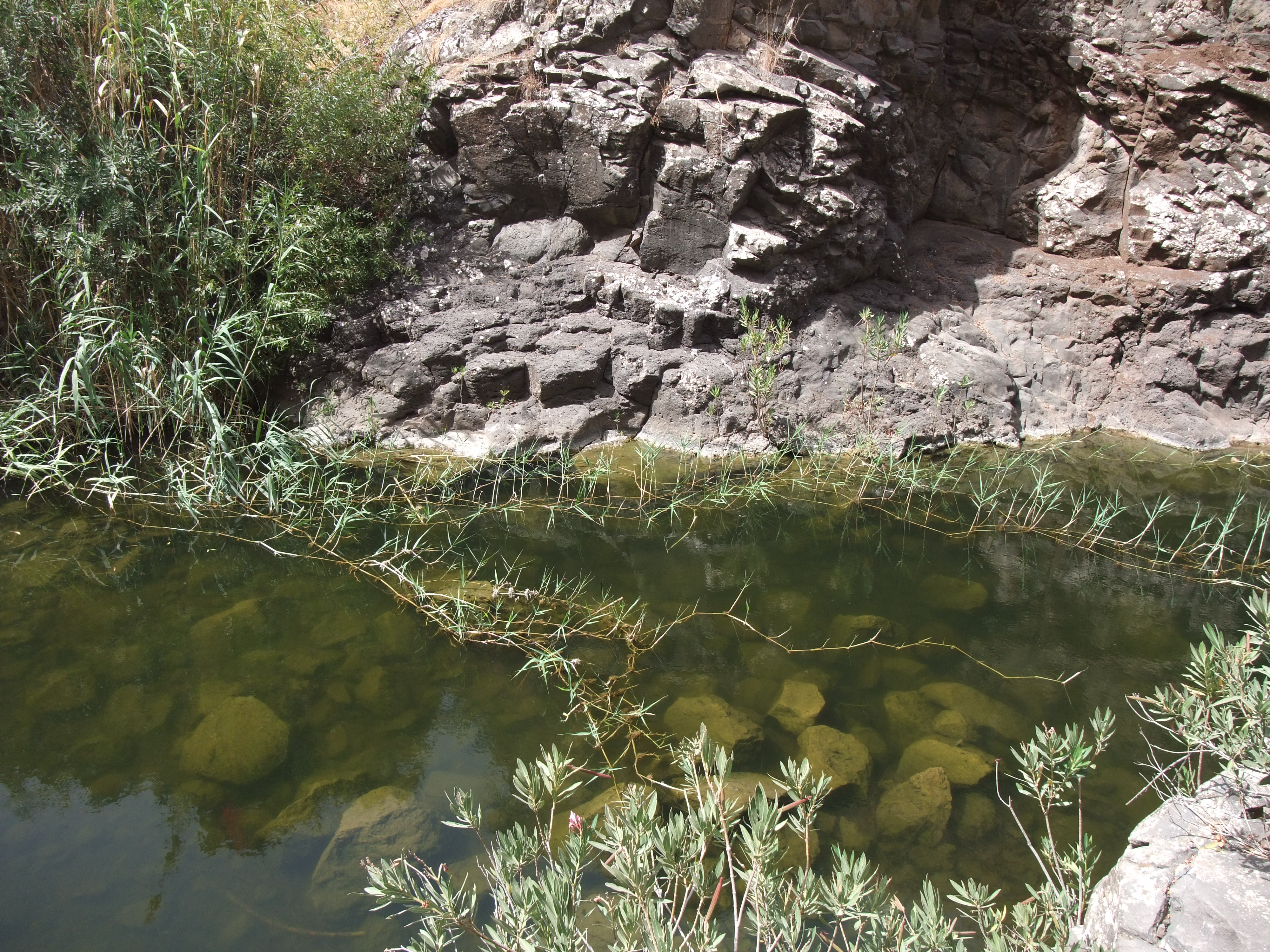 רבייה וגטטיבית באמצעות שלוחות של עשב בנחל זוויתן ברמת הגולן